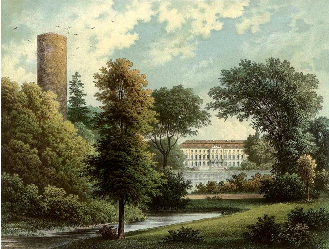 Schloss Wolfshagen mit Burg Blankenburg